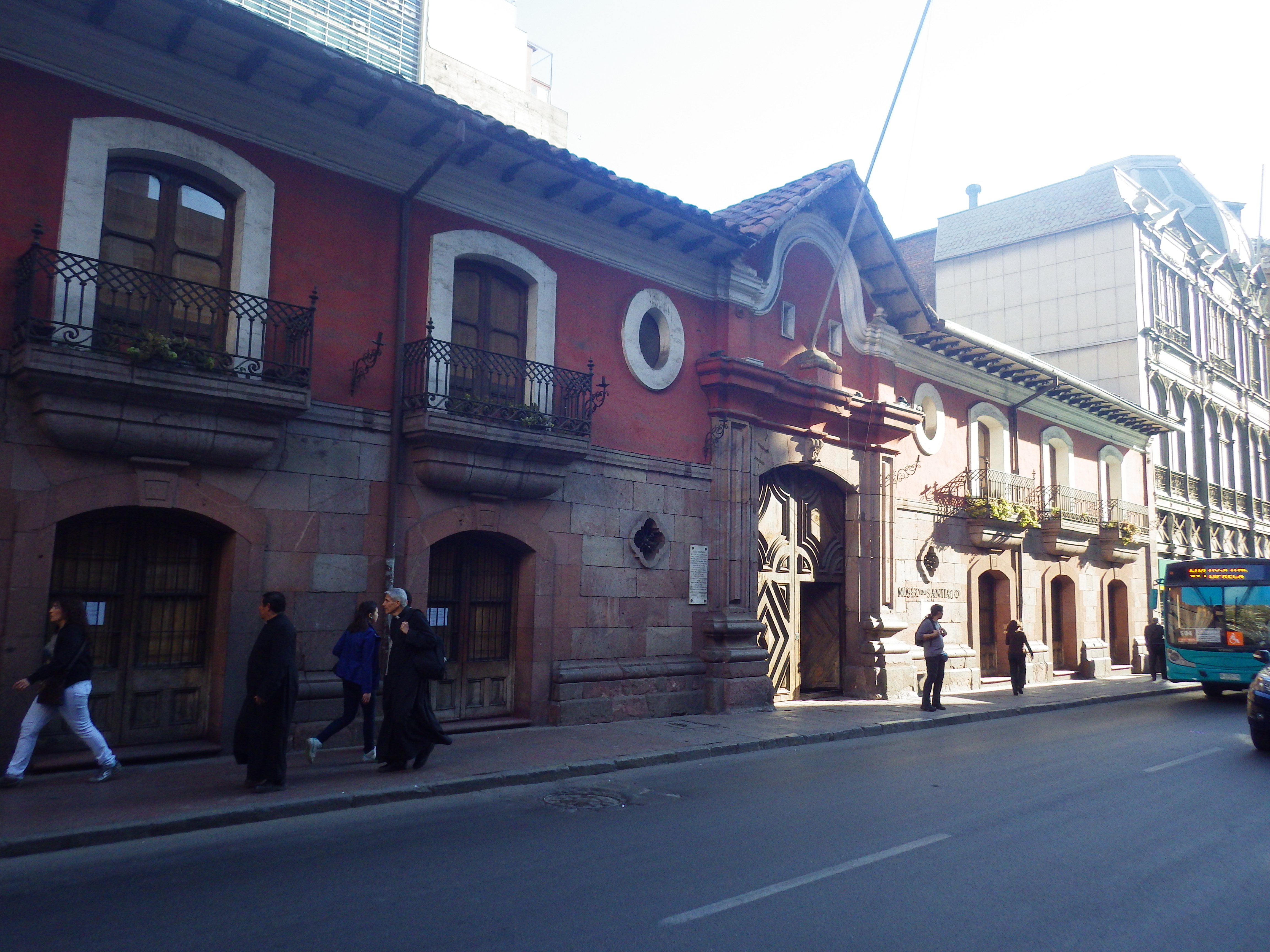 Casa Colorada This is a photo of a national monument in Chile: 211